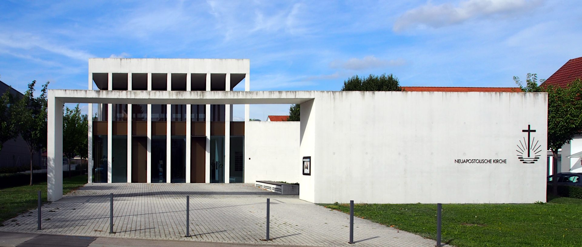 Neuapostolische Kirche in Neuhausen auf den Fildern